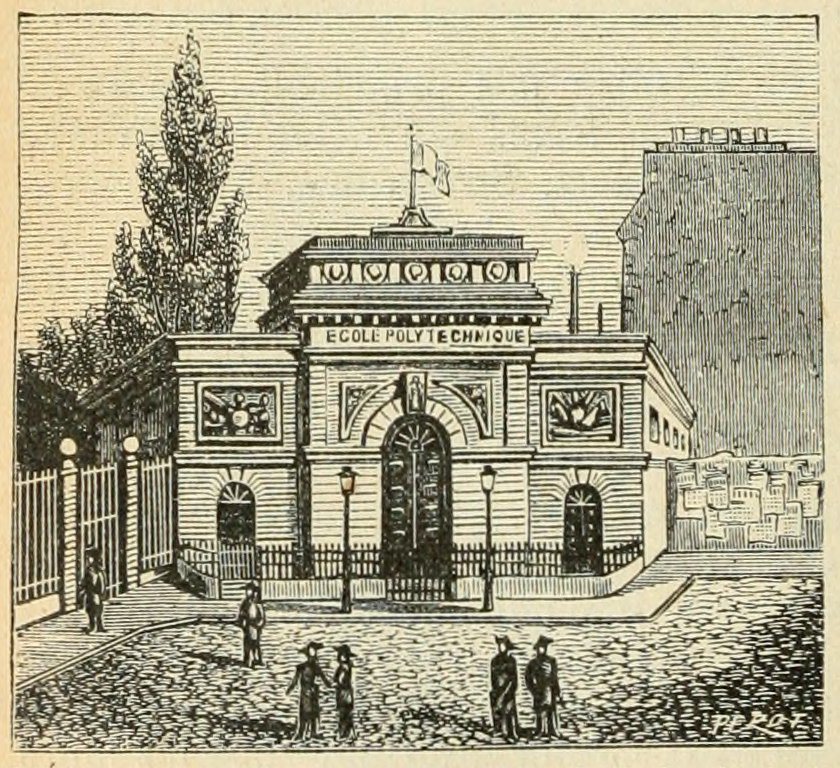 Le tour de la France par deux enfants, par George Bruno, manuel scolaire, édition de 1904.